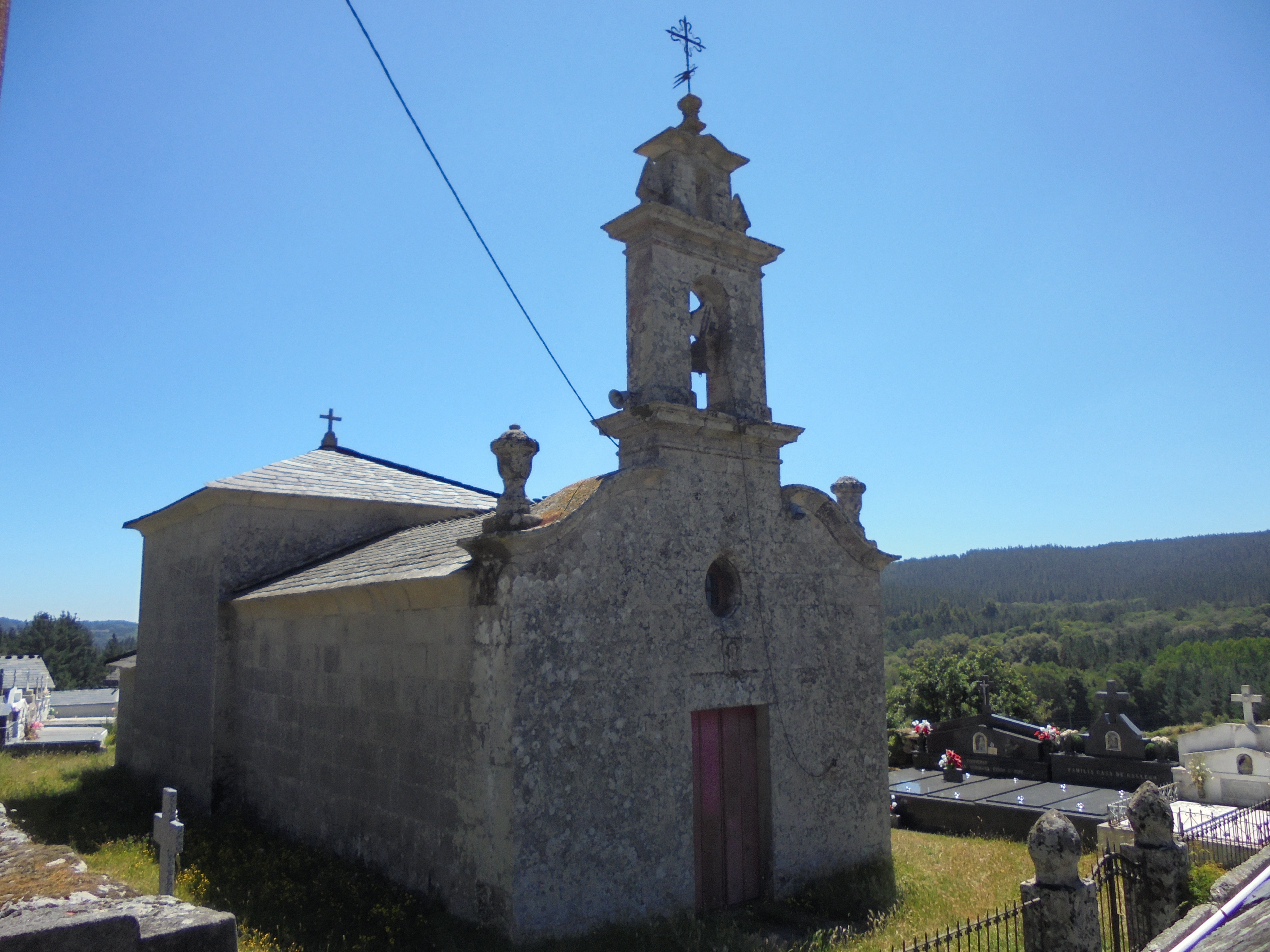 Igrexa parroquial de Santo Estevo de Camoira ( Lugo)